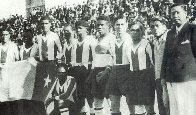 Sosteniendo la bandera chilena se encuentran Lolo Fernández, José María Lavalle y Alejandro Villanueva. Del lado derecho se encuentra el exfutbolista y director técnico del club, Jorge Koo Choi Sarmiento.